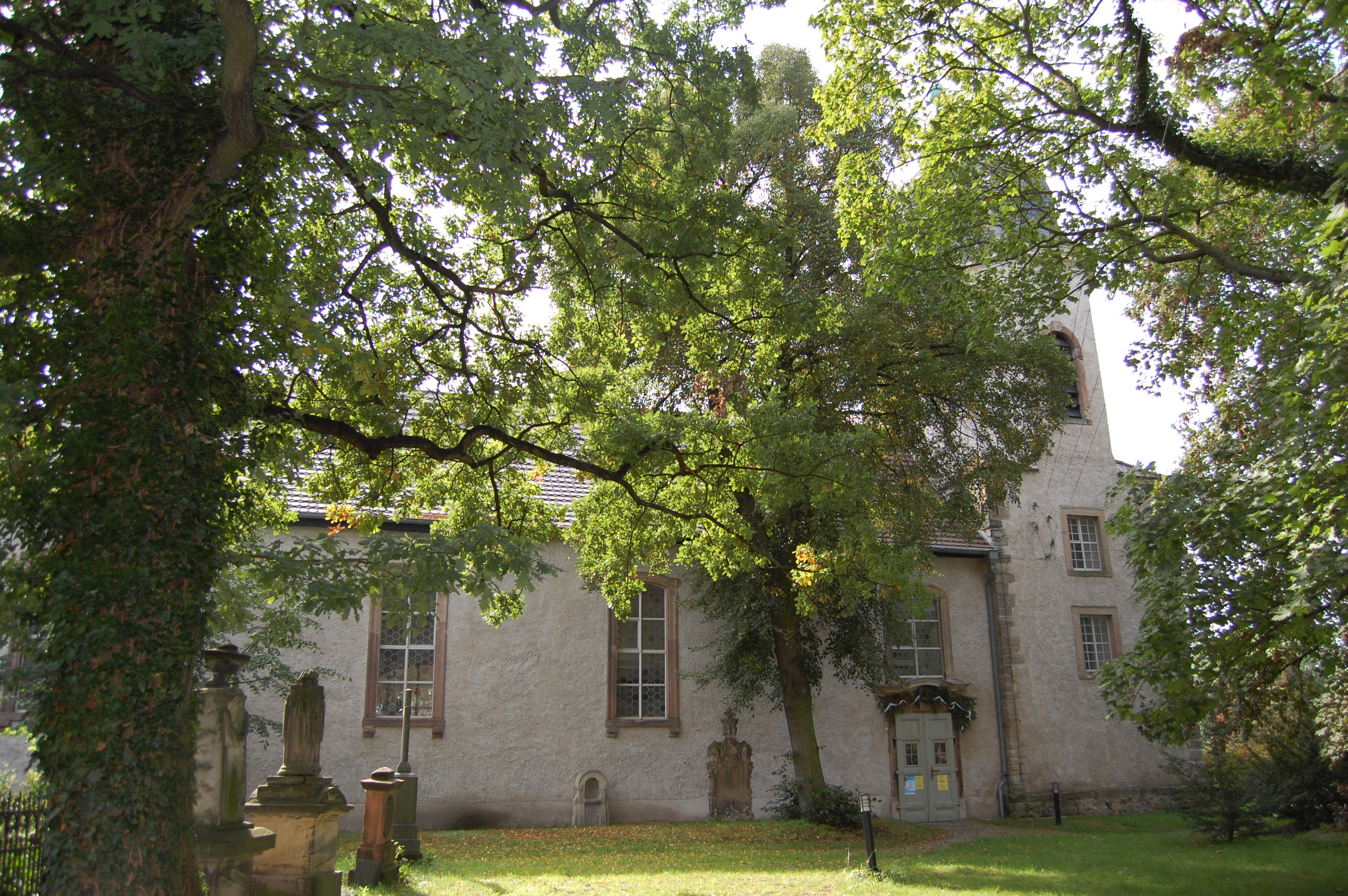 Sankt-Anna-Kirche in Dieskau